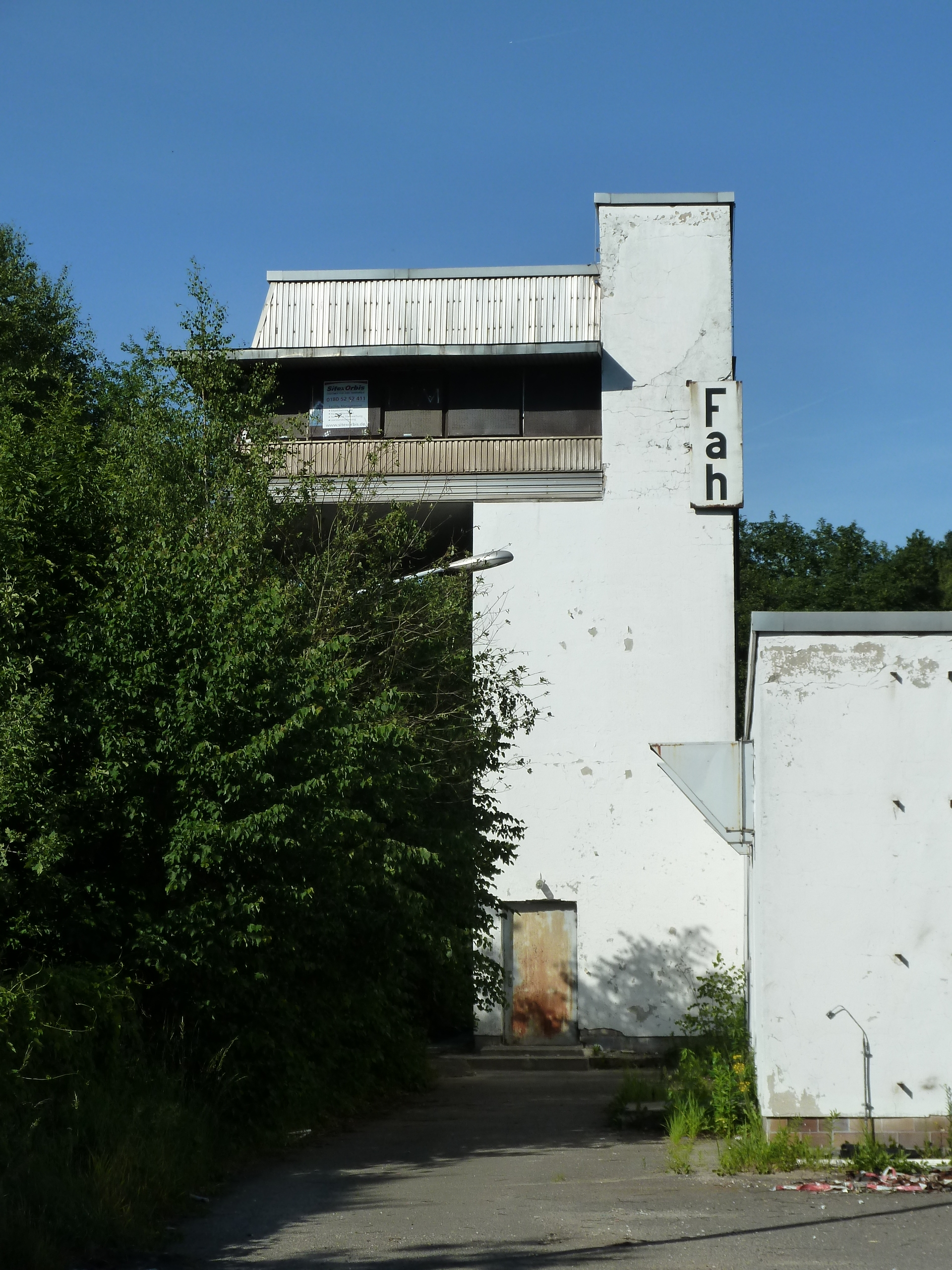 Stellwerk in Falkenhagen an der Kreuzung des Berliner Außenrings mit der Hamburger Bahn